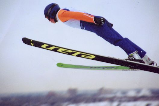 A ski jumper in Calgary, Canada.